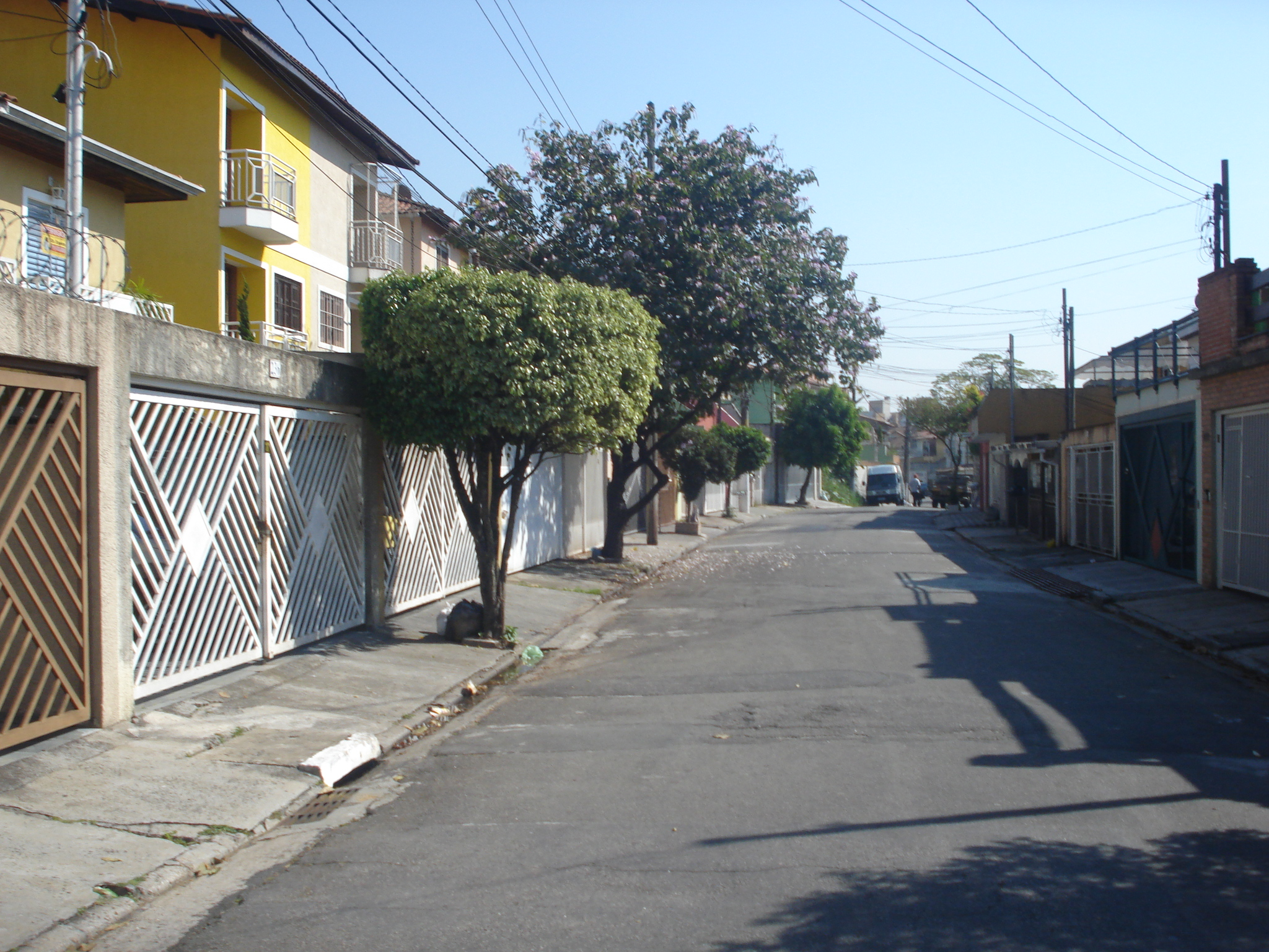 Casas do Parque Ipê